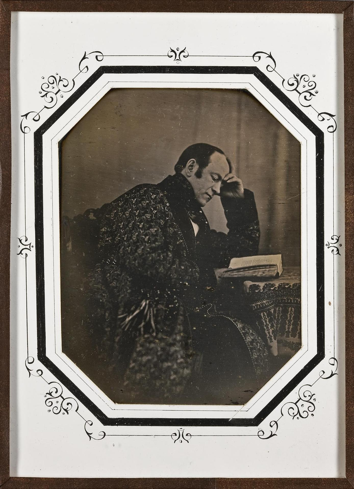 Граф Алексей Алексеевич Бобринский-старший